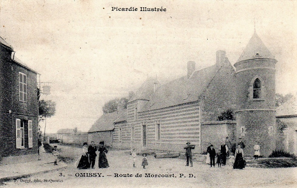 Carte postale du village vers 1910.